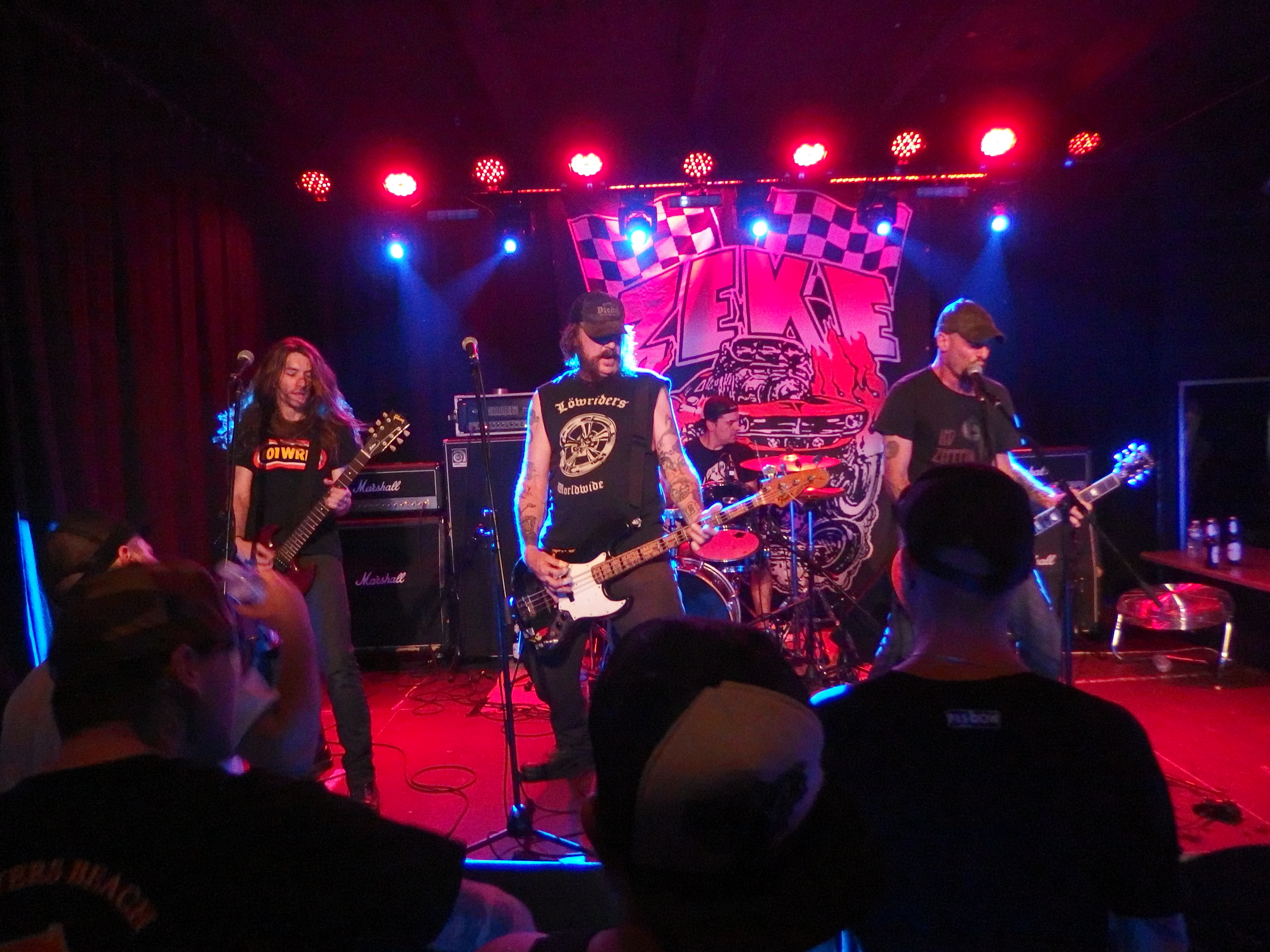 Christmas live im Kleinen Klub der Garage (Saarbrücken)